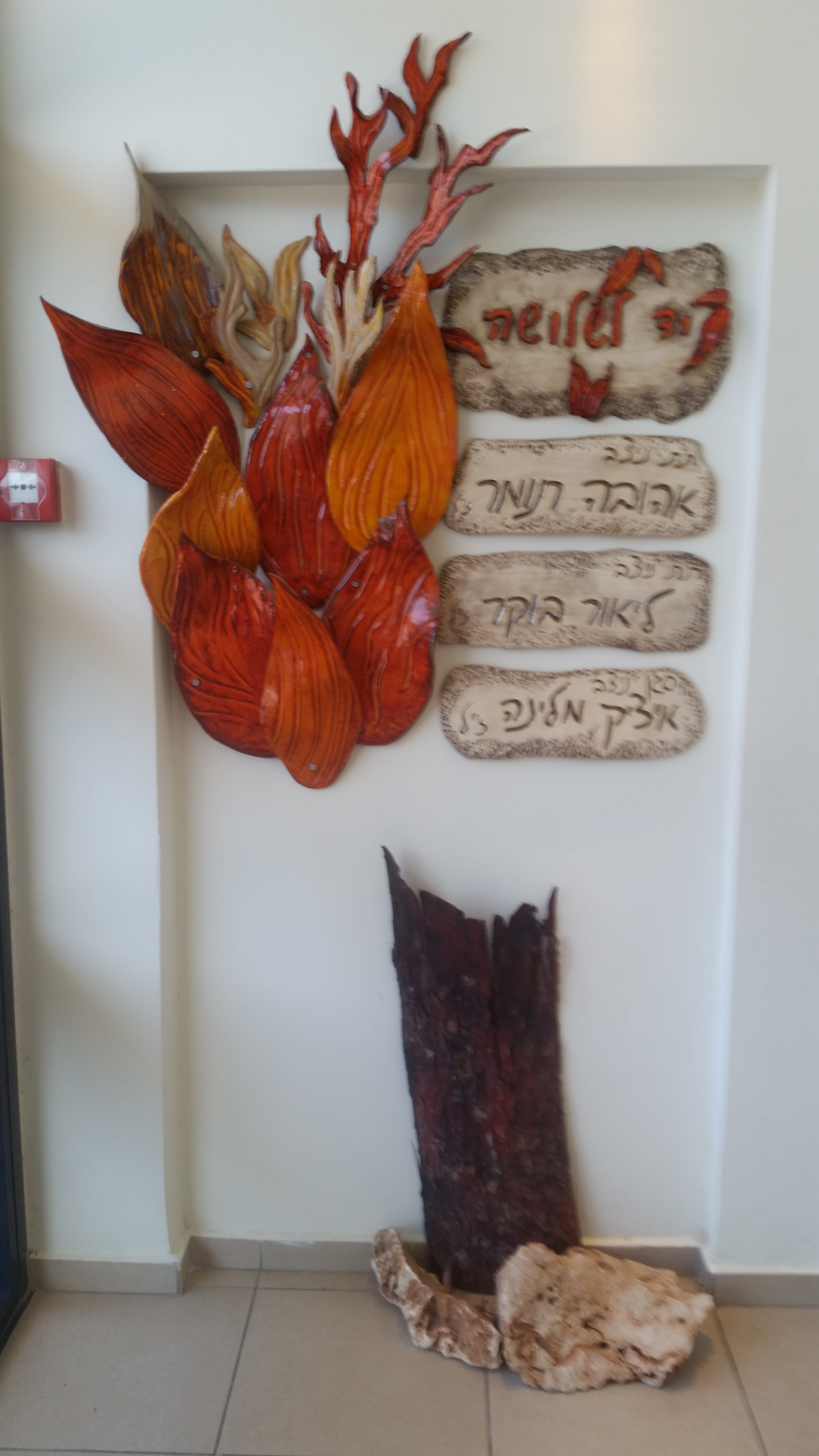 אנדרטה לשוטרים שניספו בשריפה בכניסה לתחנת משטרת נשר